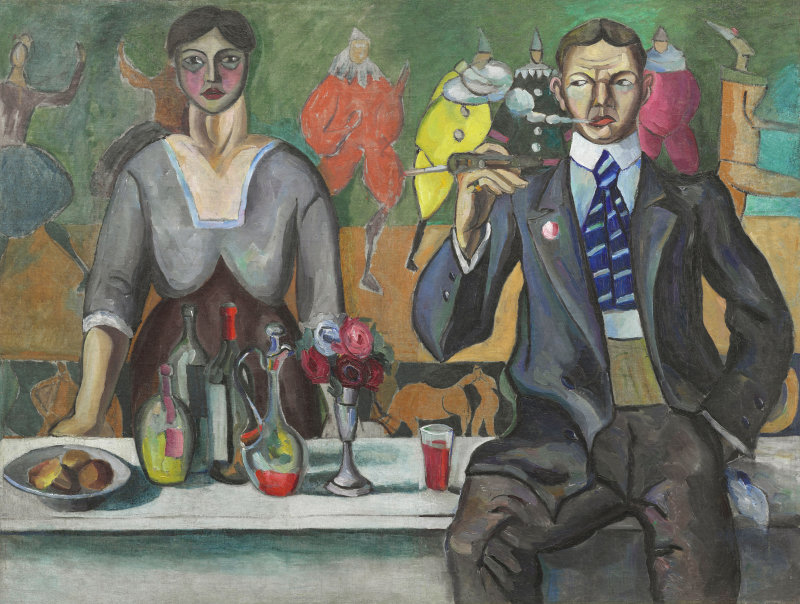 Алексей Моргунов. Портрет Натальи Гончаровой и Михаила Ларионова. 1913. Холст, масло. 104.1 x 136.5. Чикагский иститут искусств